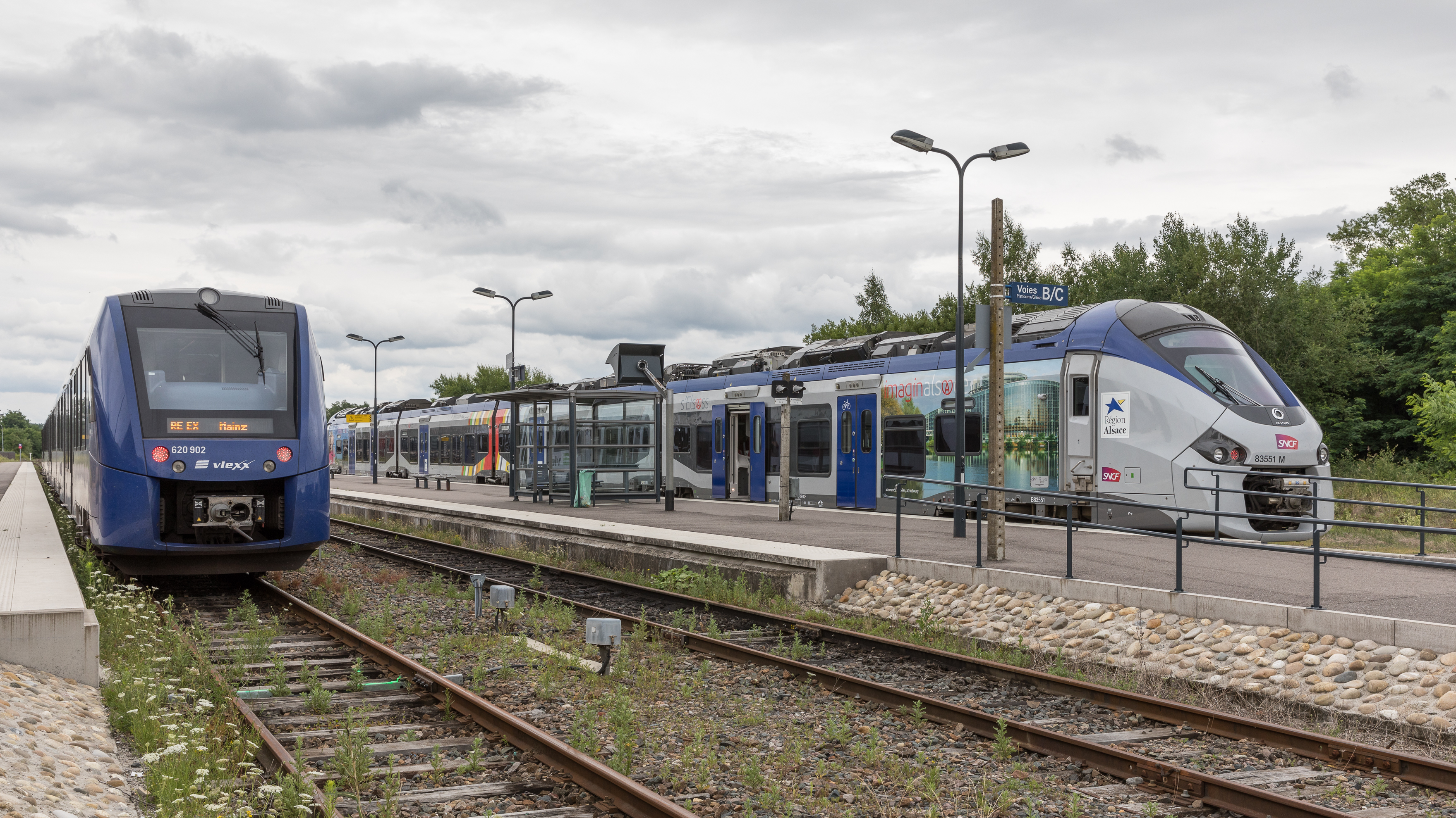 Vlexx Regioexpress nach Mainz und SNCF TER nach Strasbourg im Bahnhof Wissembourg, Alsace